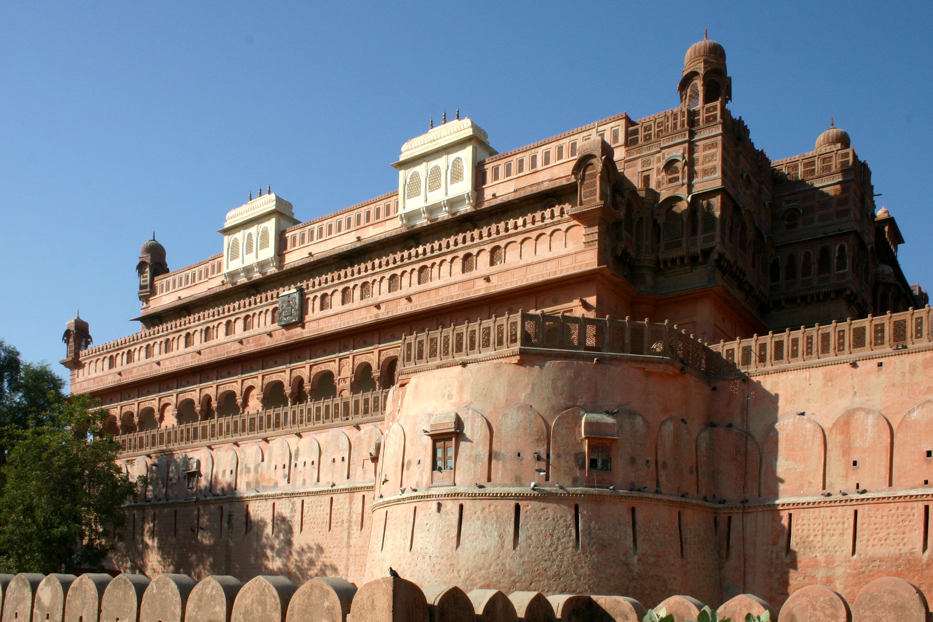 Junagarh Fort - Der Stadtpalast von Bikaner